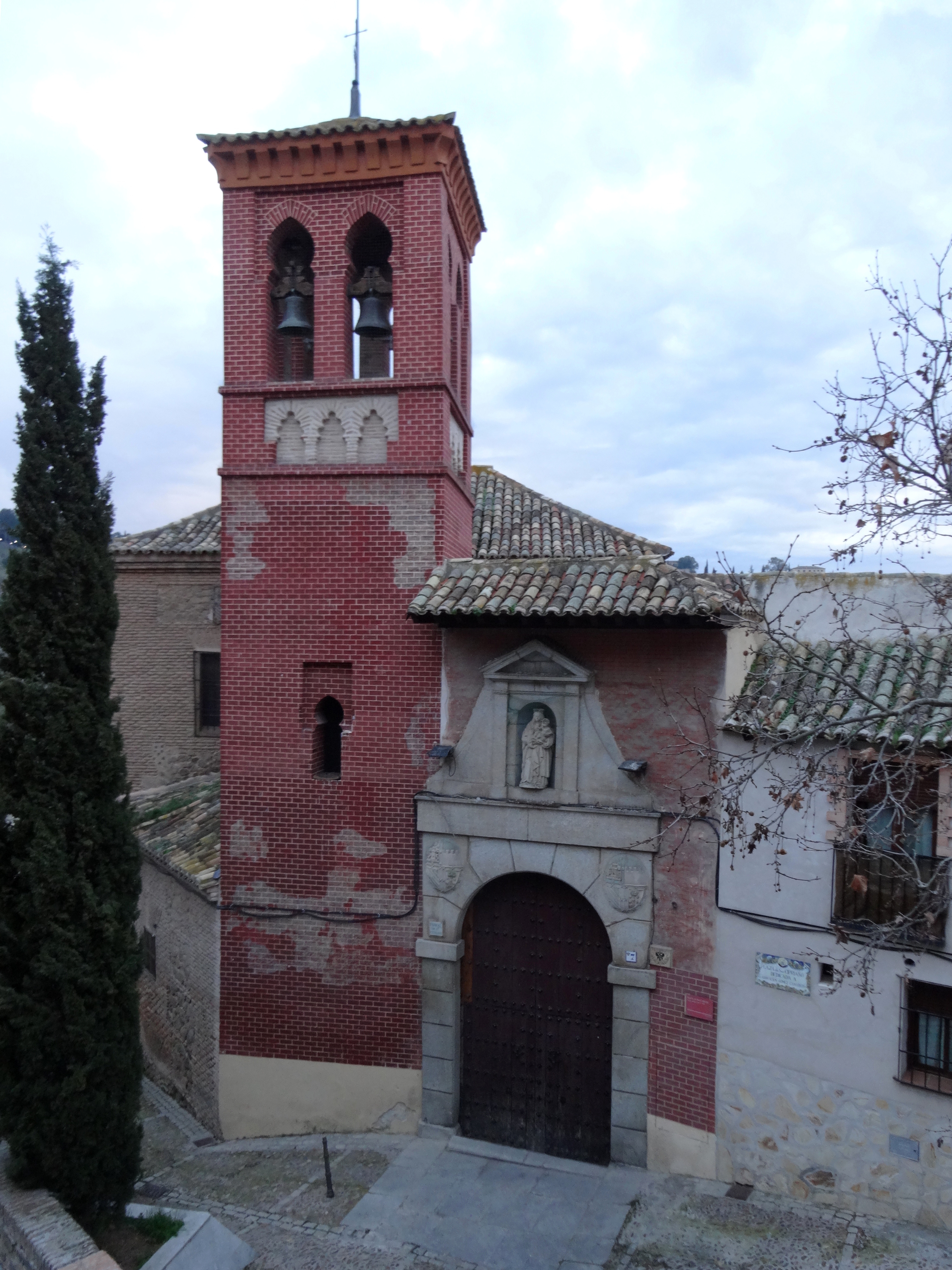 Iglesia de San Cipriano, Toledo (España).